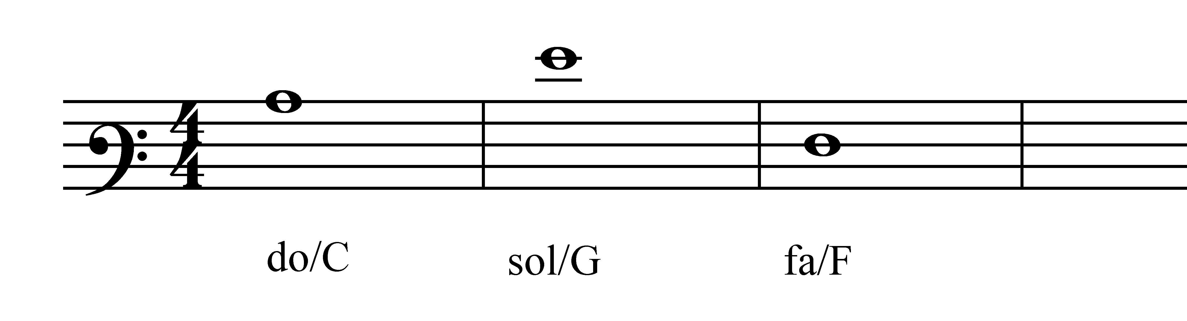 Baritonsleutel met f-sleutel. Eigen werk.